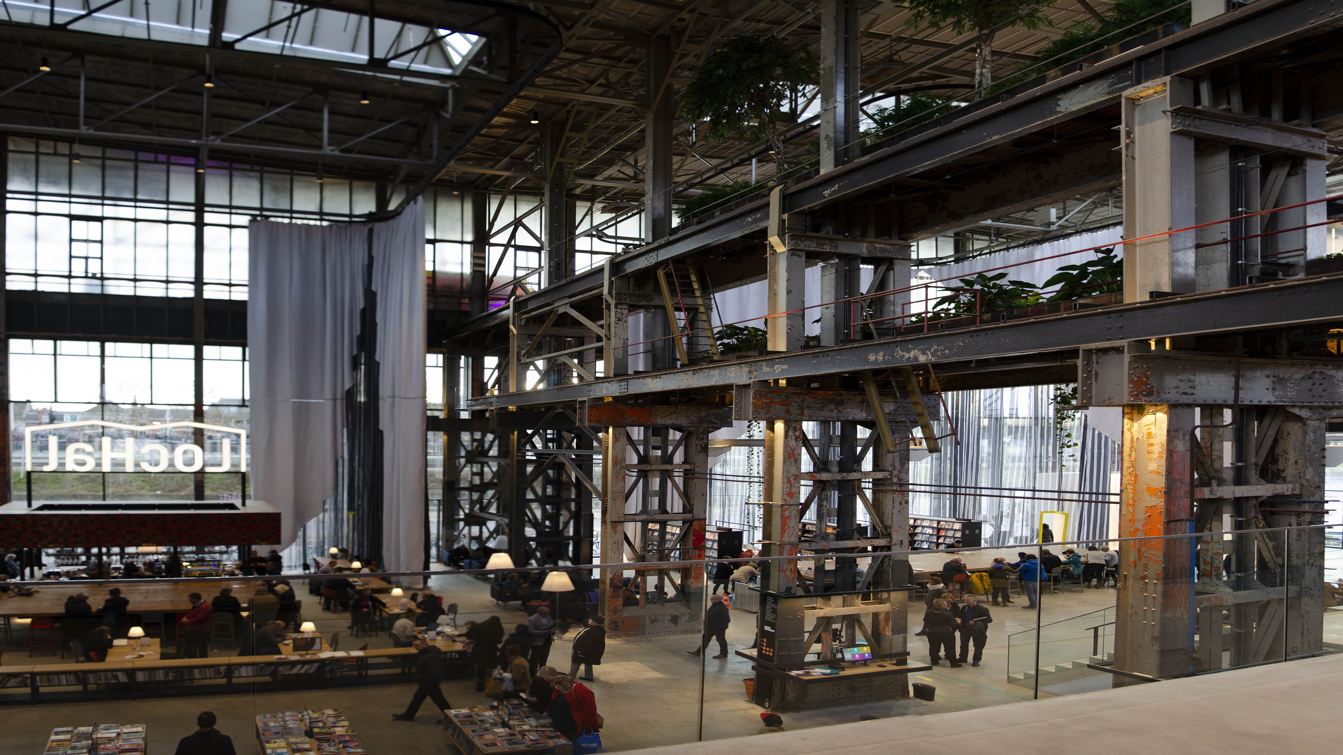 Bibliotheek Tilburg in de LocHal net na de opening op 2 januari 2019